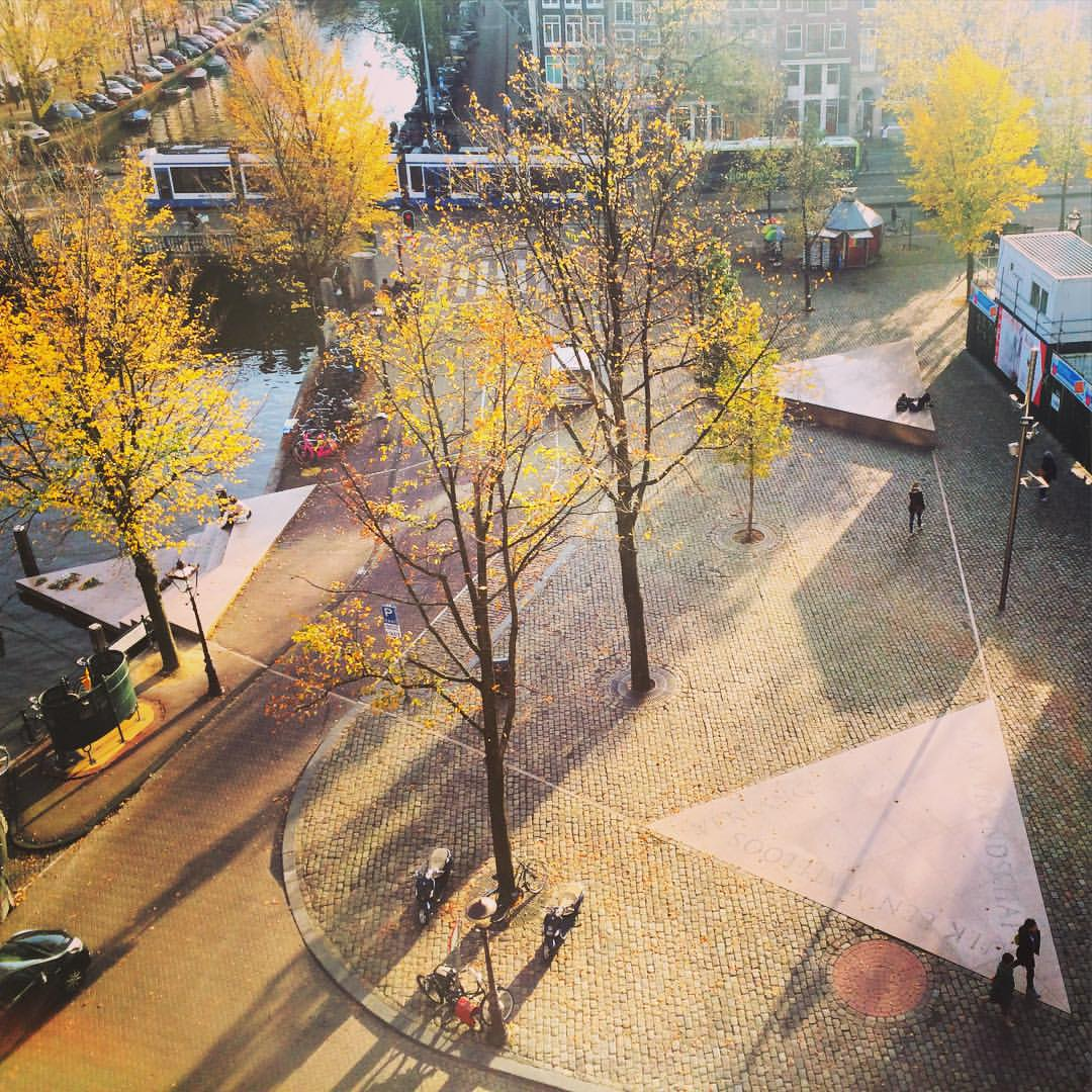 Homomonument gezien vanuit de bovensteverdieping van Westermarkt 2.